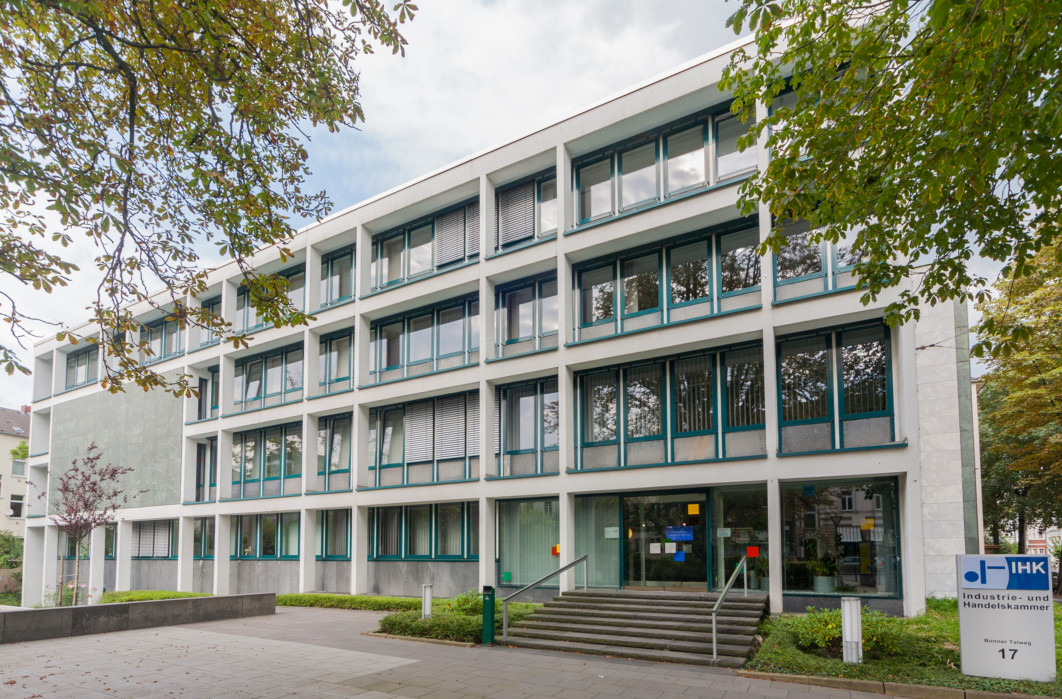 IHK, Bonner Talweg 17, Bonn-Südstadt: Ansicht aus Süden